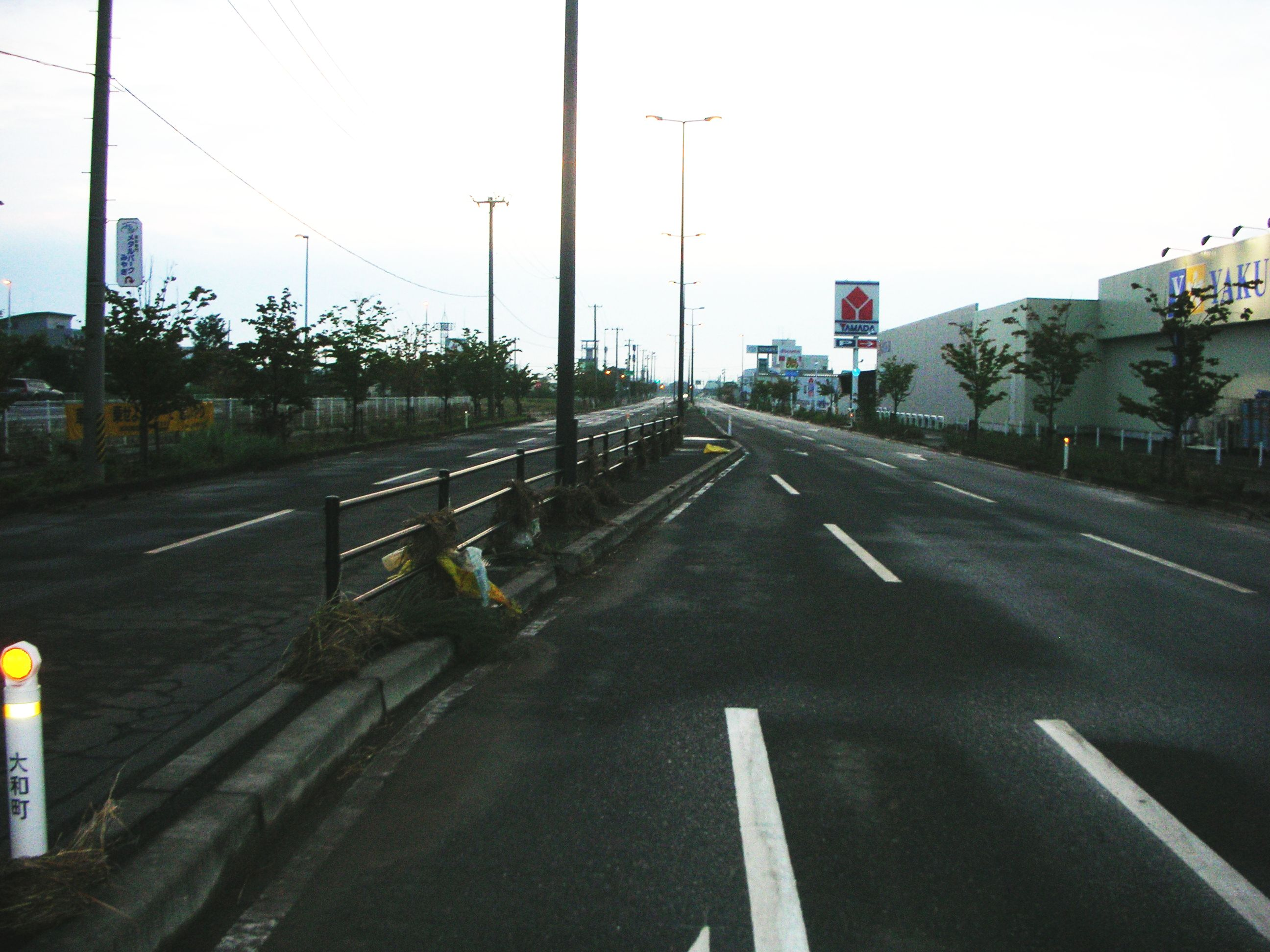 洪水が去った後のヤマダ電機前